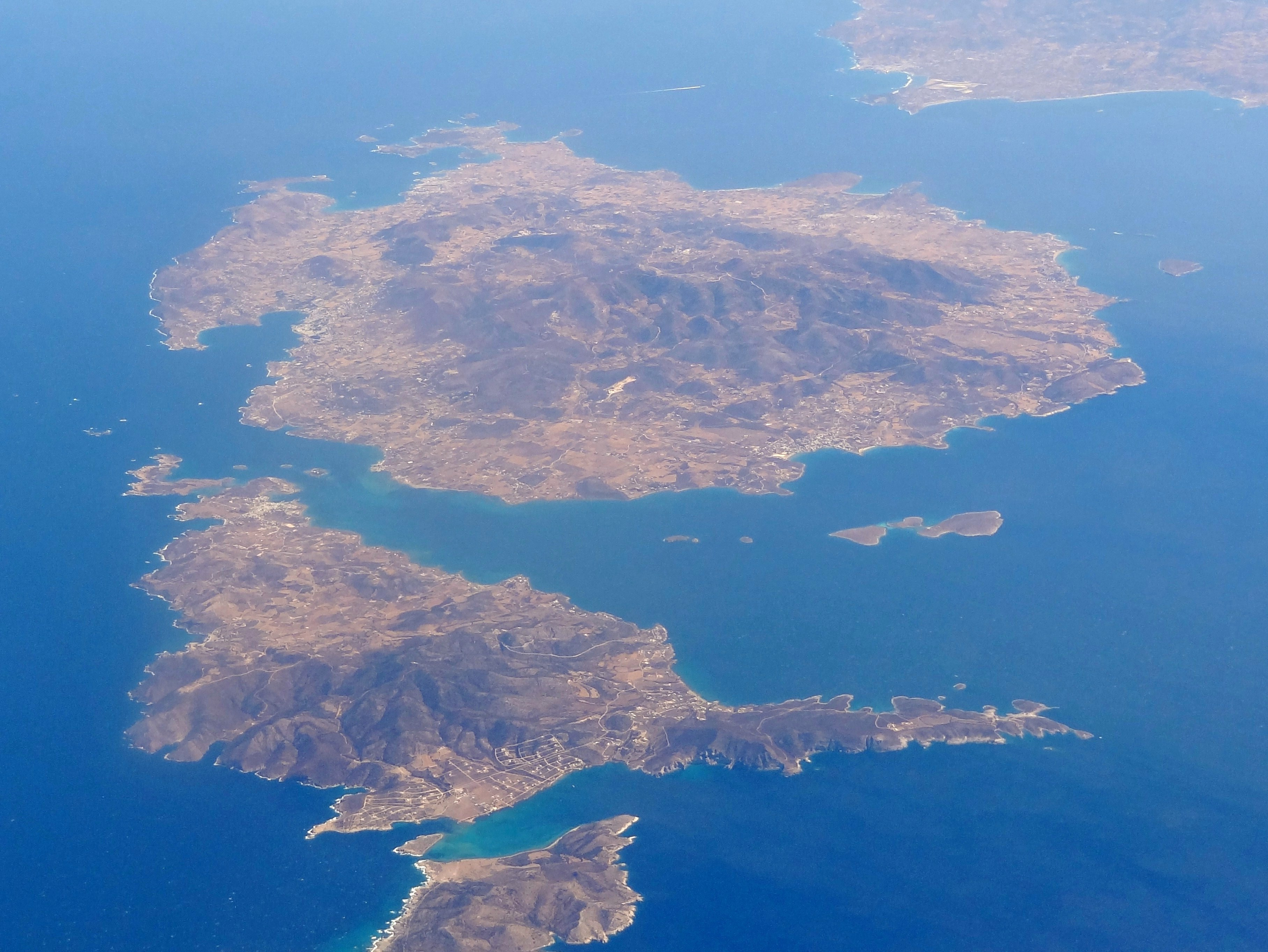 Inseln Paros (Πάρος) und Andiparos (Αντίπαρος), Gemeinden Paros und Andiparos, Kykladen, südliche Ägäis, Griechenland